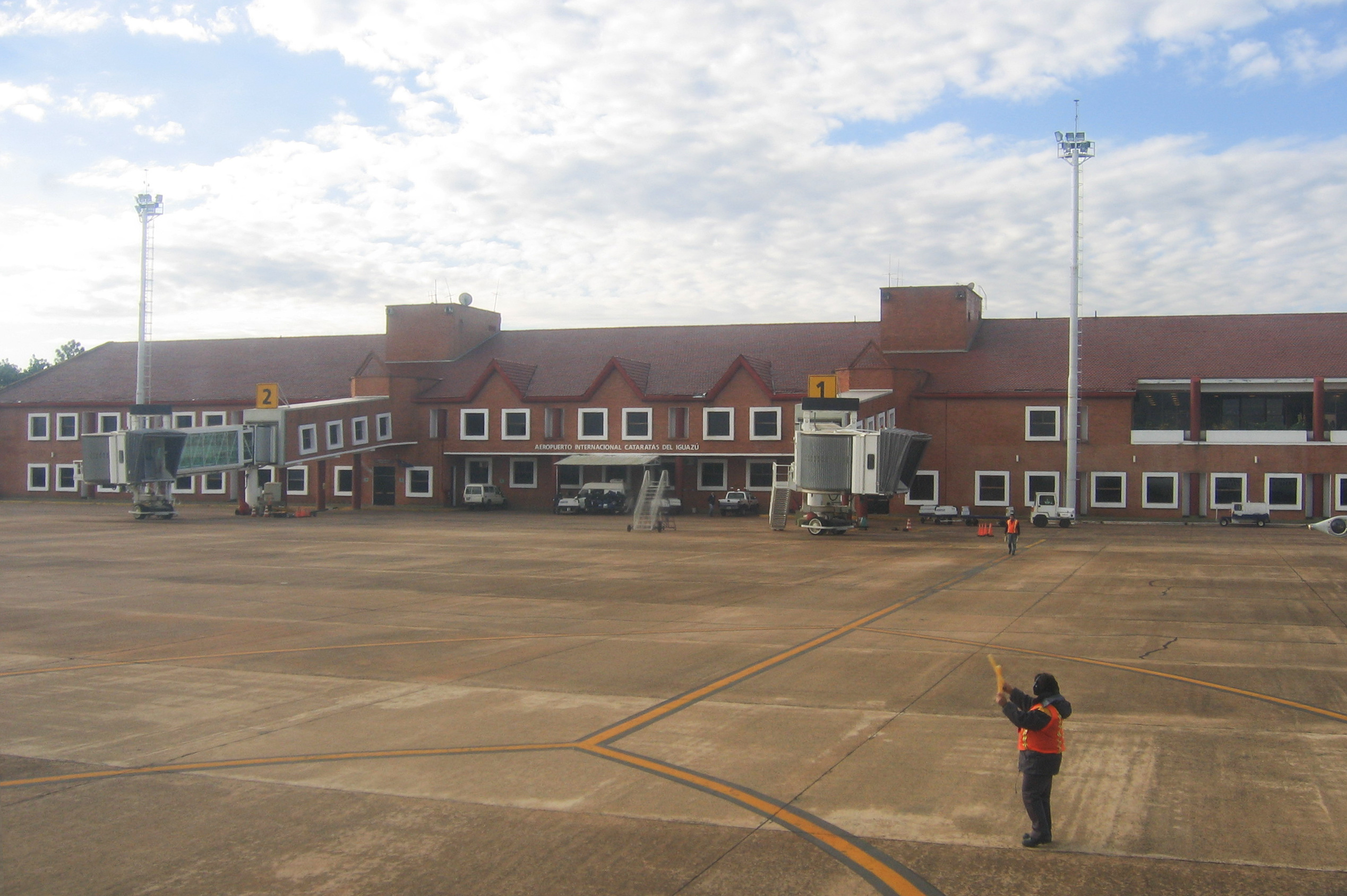 Aeropuerto Iguazú